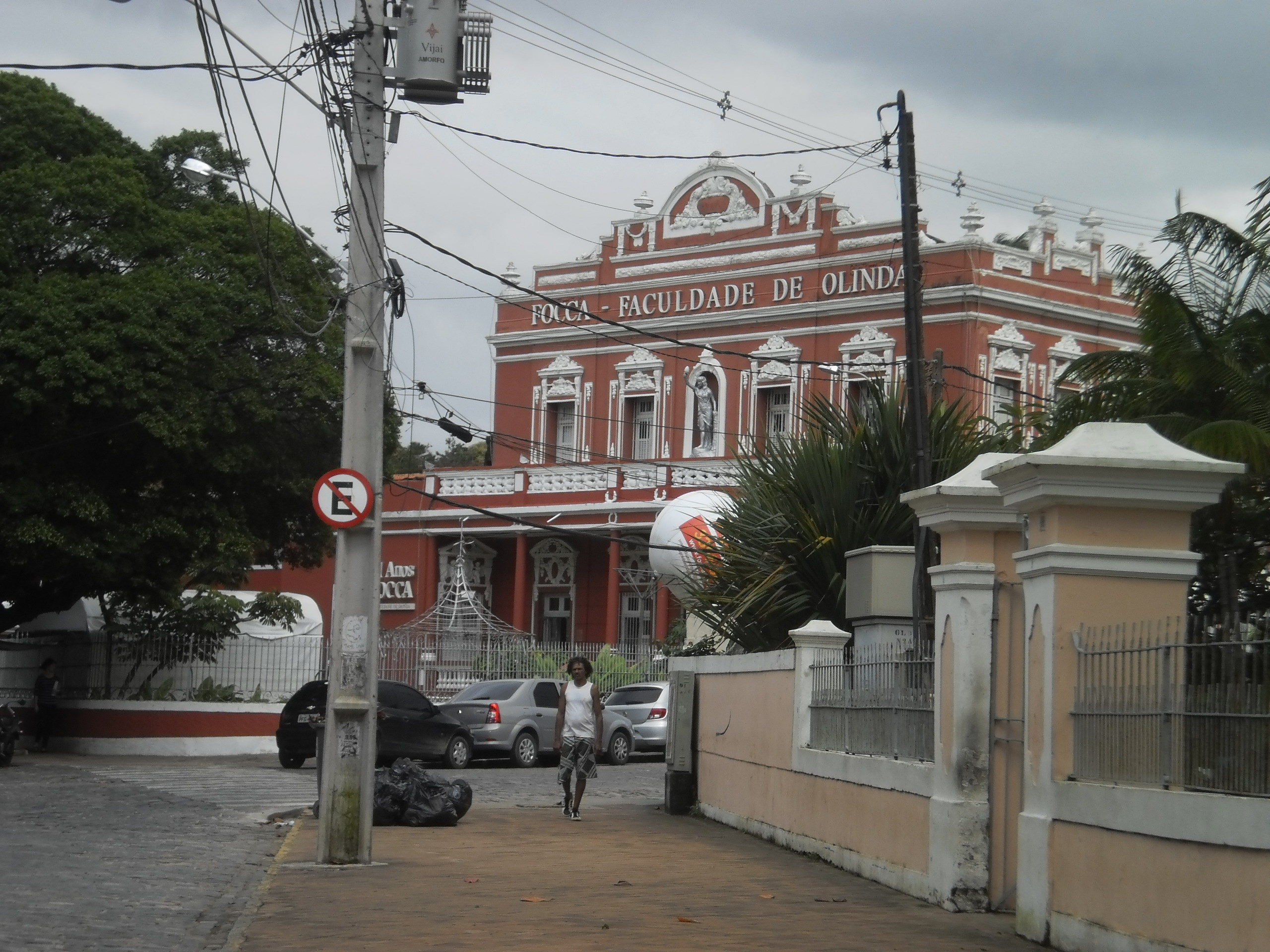 Faculdade Olindense de Ciências Contábeis e Administrativas (FOCCA). Rua Bonfim, Carmo, Olinda - Pernambuco, Brasil